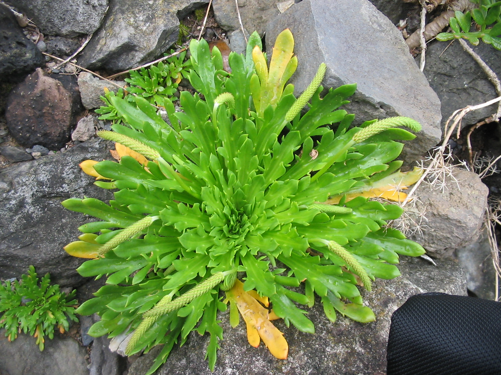 Krähenfuß-Wegerich (Plantago coronopus) - Habitus